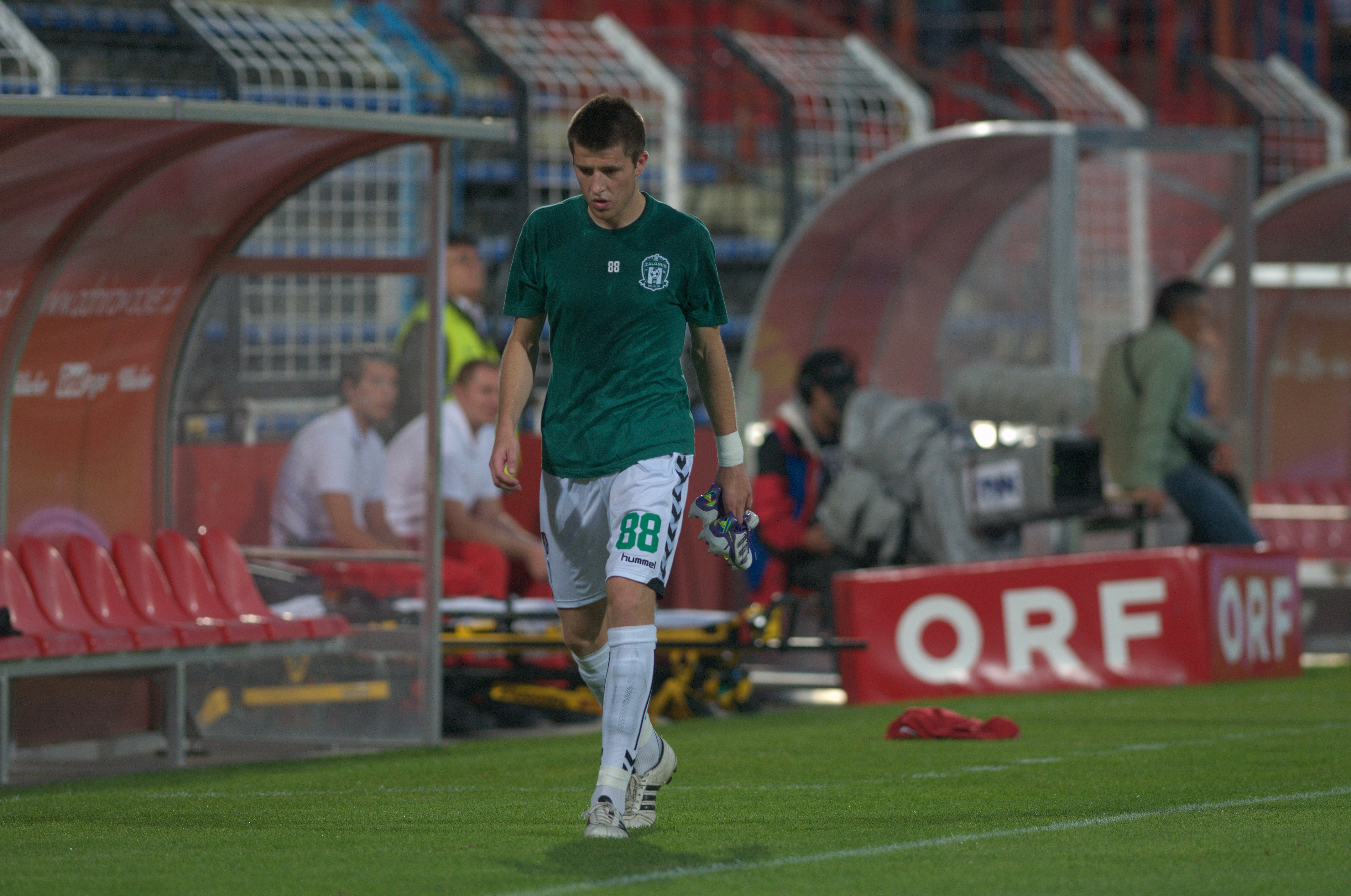 Zalgiris-Spieler Mantas Kuklys beim Europa-League-Qualifikationsspiel gegen Admira